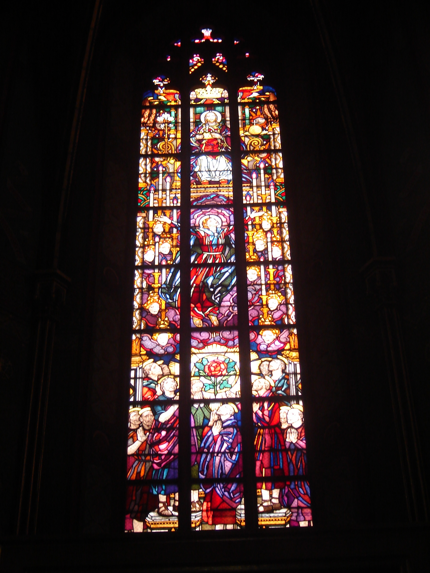 katedra p.w. Wniebowzięcia NMP, XIV/XV, XVI-XVII, 1891 Włocławek, ul. Gdańska 3, miasto Włocławek